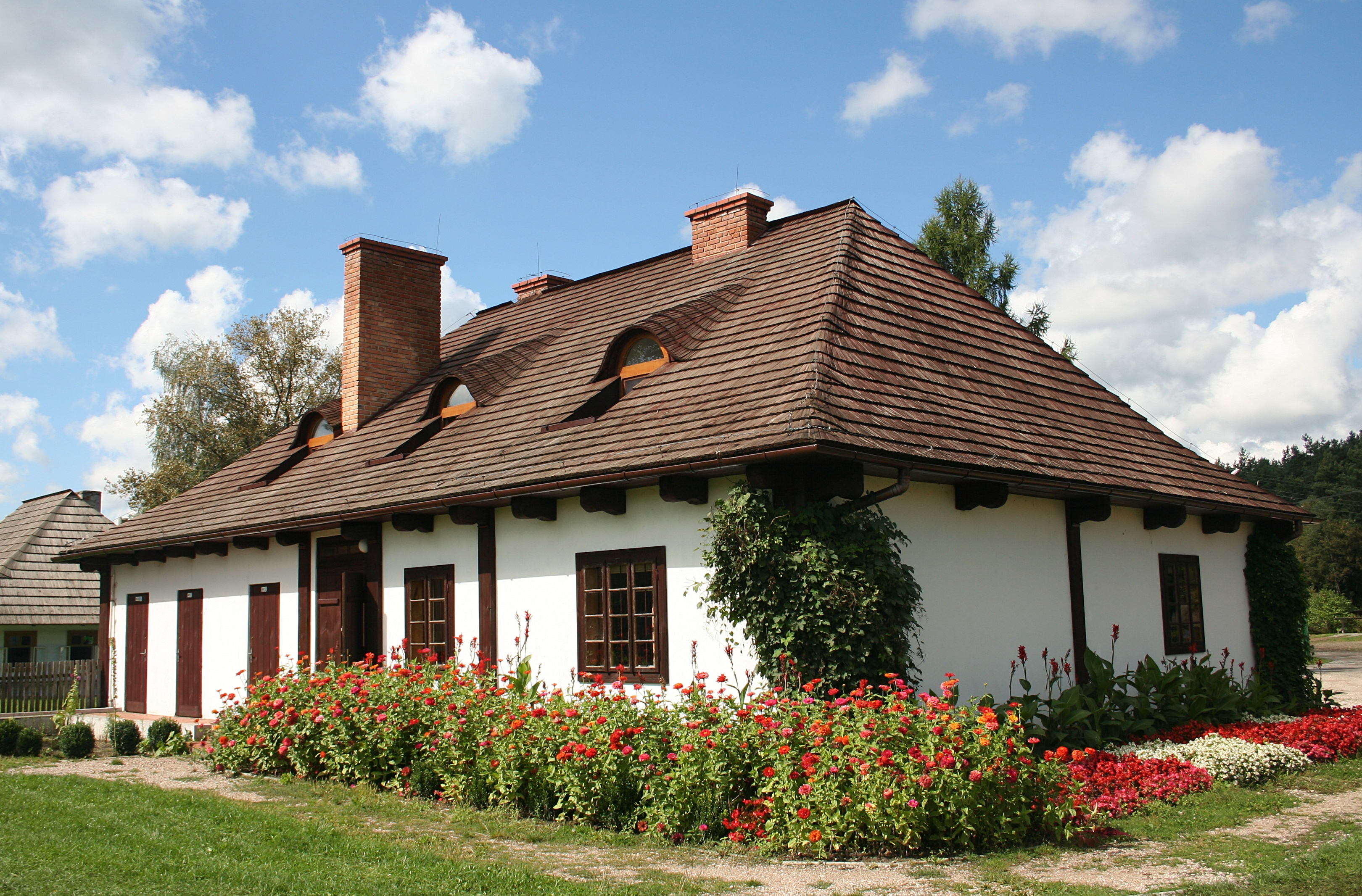 Muzeum Kultury Ludowej w Kolbuszowej. Chałupa z Sędziszowa Małopolskiego